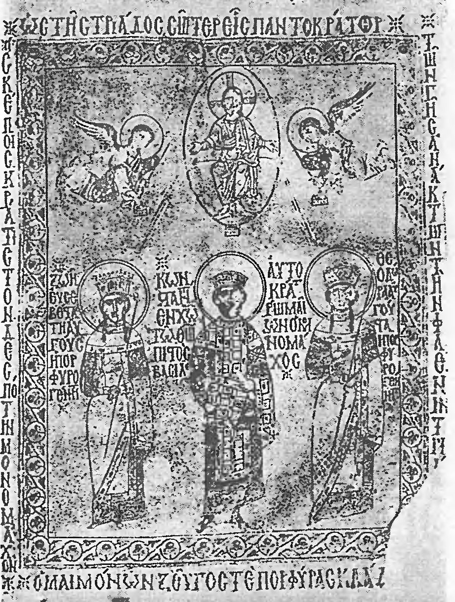 Зоя Порфирородная, Константин IX Мономах, Феодора (фронтиспис синайского сборника проповедей Иоанна Златоуста)